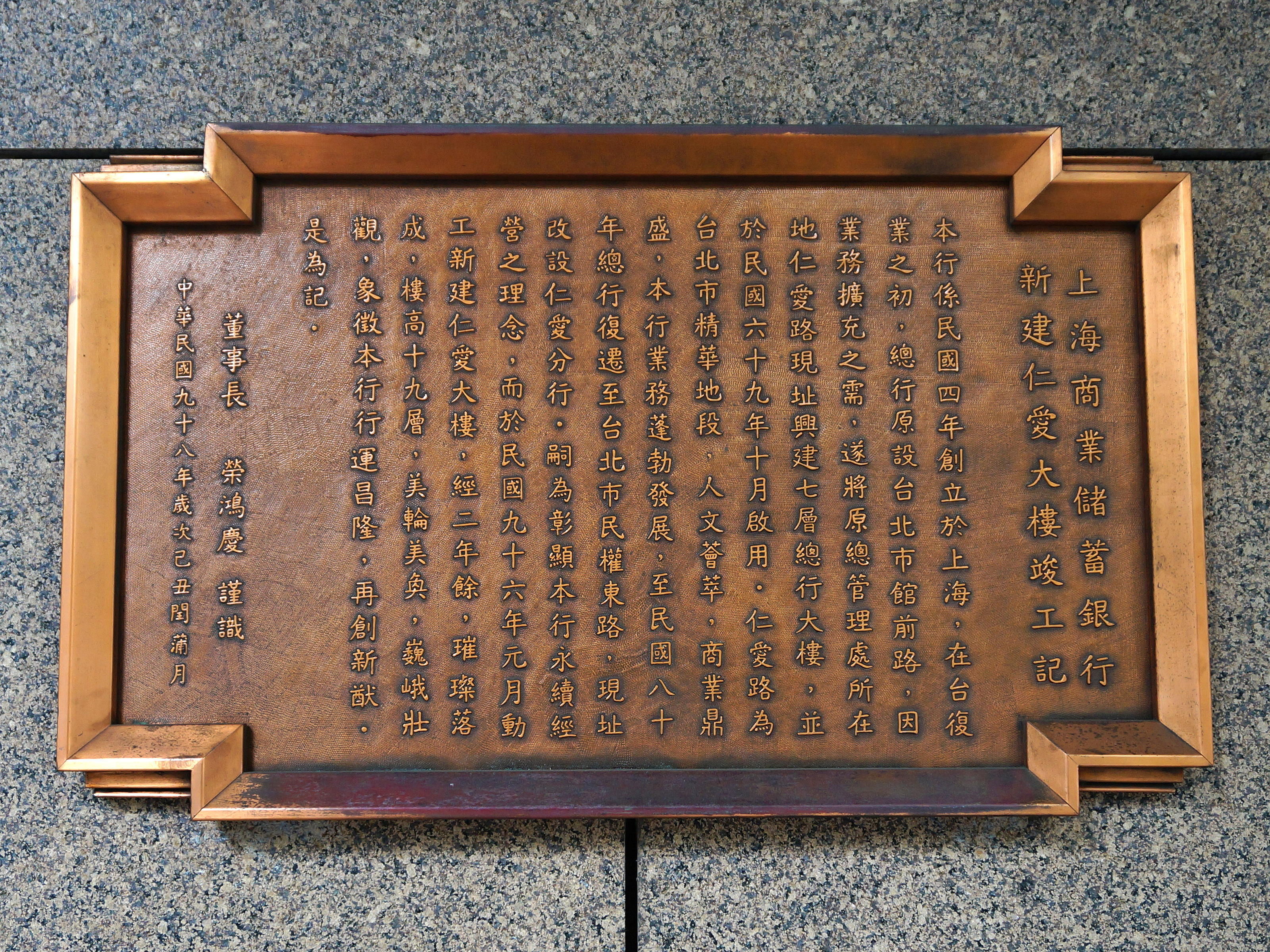 上海商業儲蓄銀行新建仁愛大樓竣工記，2009年（中華民國98年）上海商業儲蓄銀行董事長榮鴻慶撰文，位於上海銀行仁愛大廈一樓騎樓。